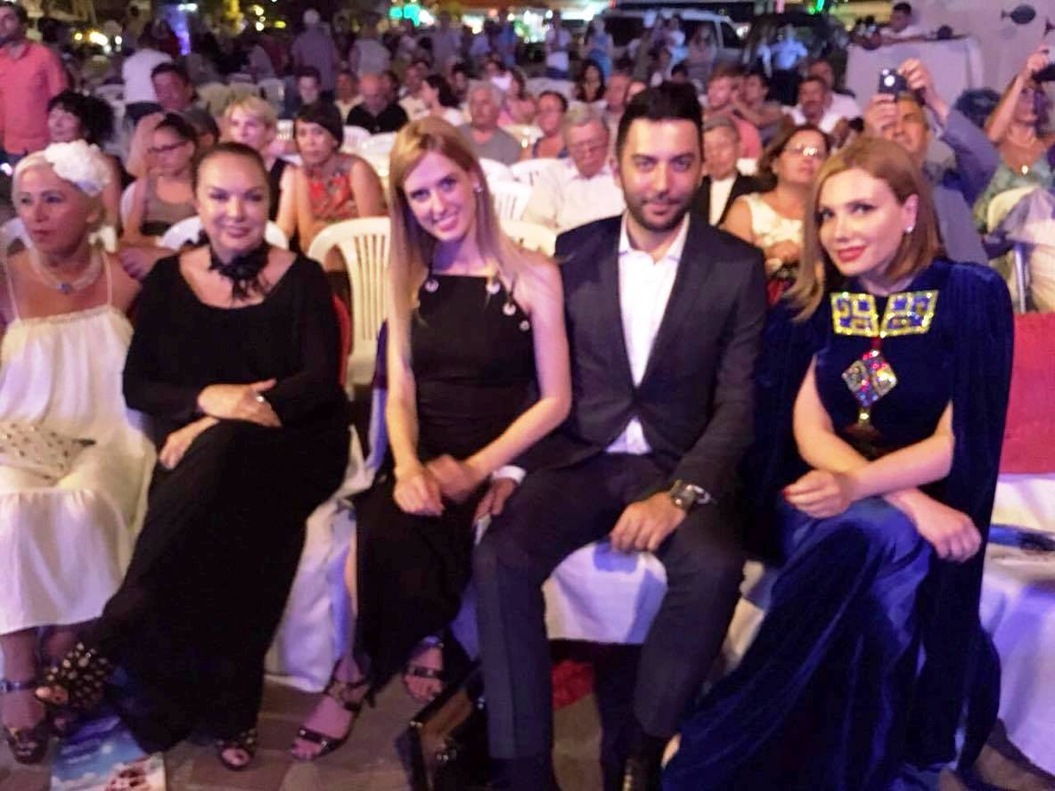 Letafet Elekberova Turkiyede tedbirde